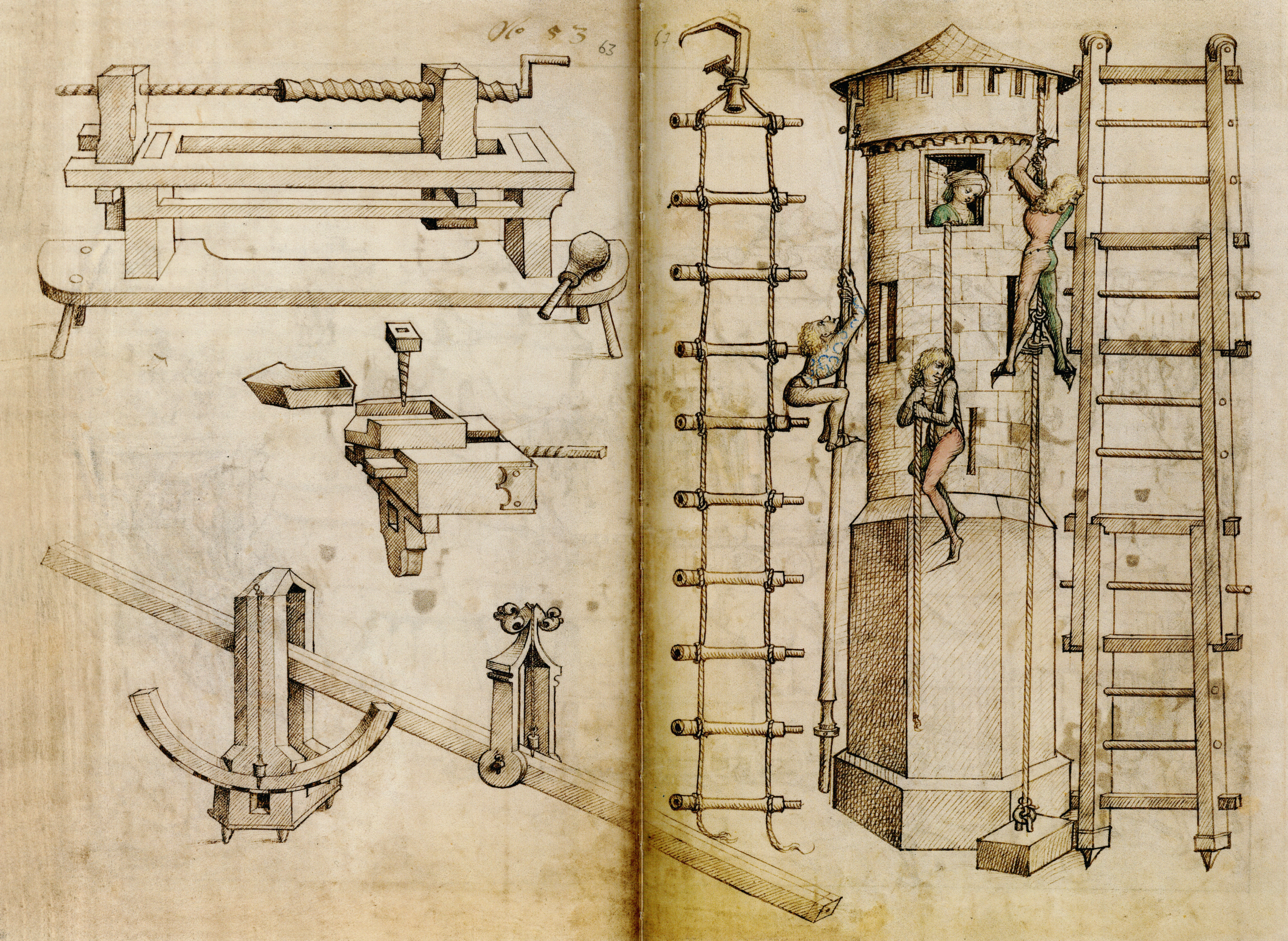 Mittelalterliches Hausbuch von Schloss Wolfegg Fol. 53v–53v1: Drehbank mit Support, Waage, Steiggeräte (Strickleiter, Steigbaum)